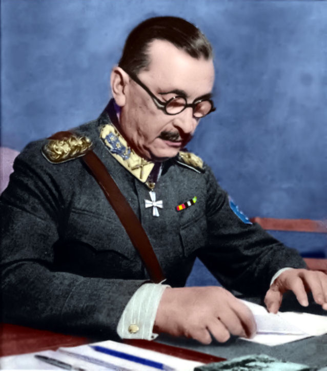 Marsalkka Mennerheim